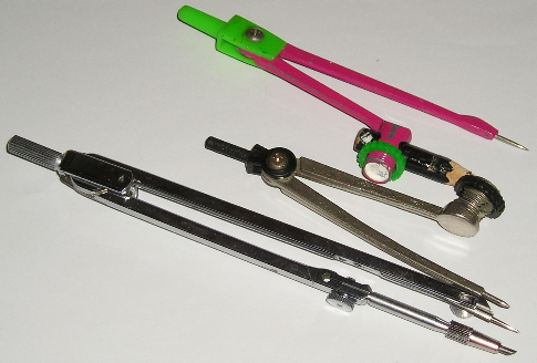 我的圓規